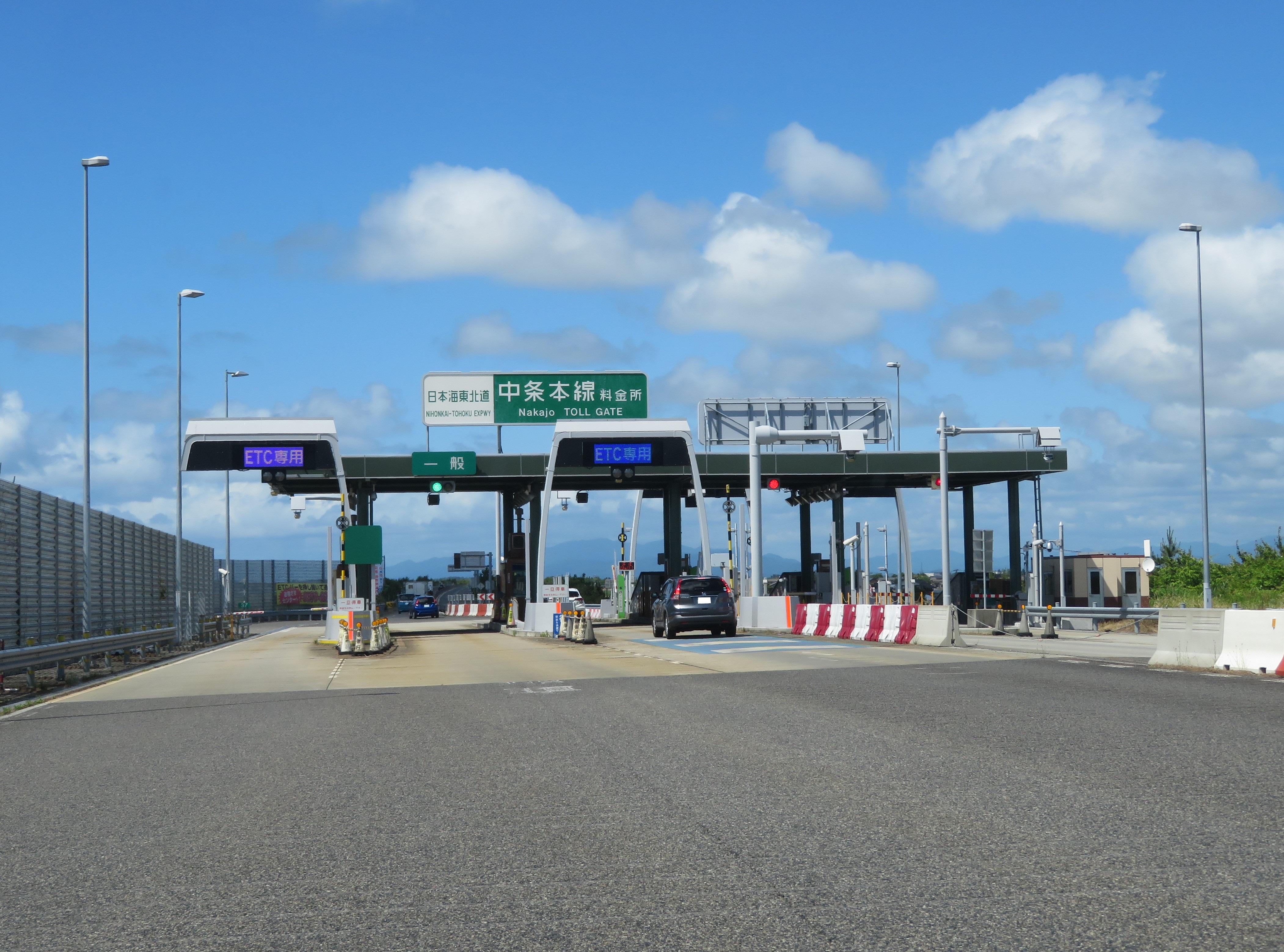 日本海東北自動車道中条本線料金所（新潟方面側から撮影） Canon PowerShot SX720 HS